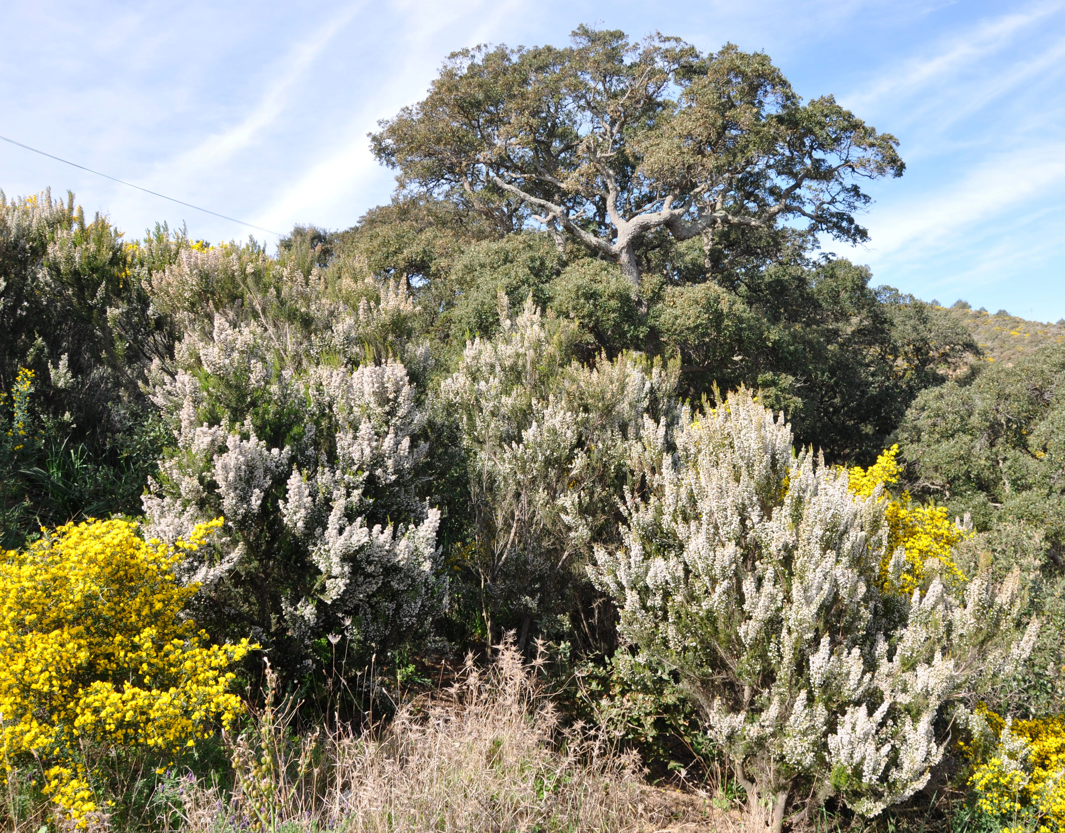 Brezo blanco, erguén y alcornoque, Ceuta, España.